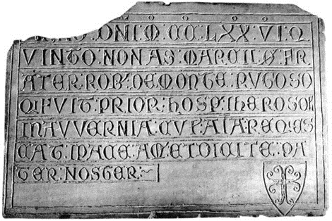 Photo de l’épitaphe de Robert de Montrognon